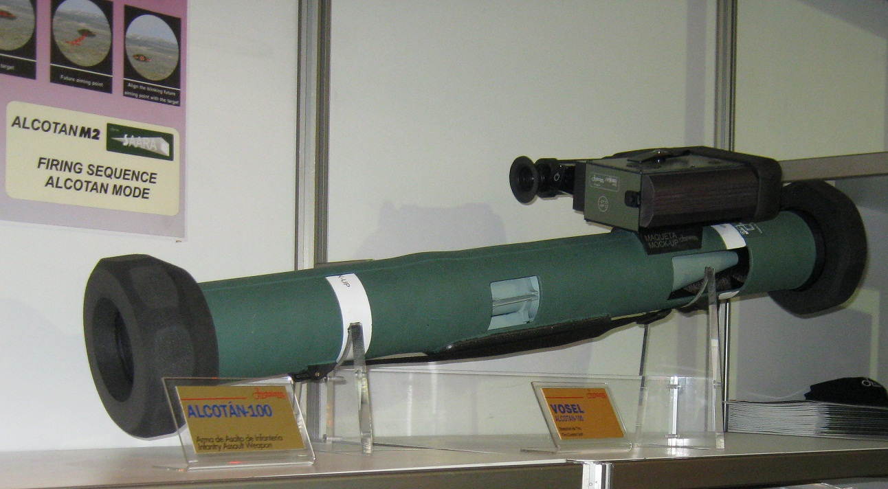 Instalaza Alcotán 100